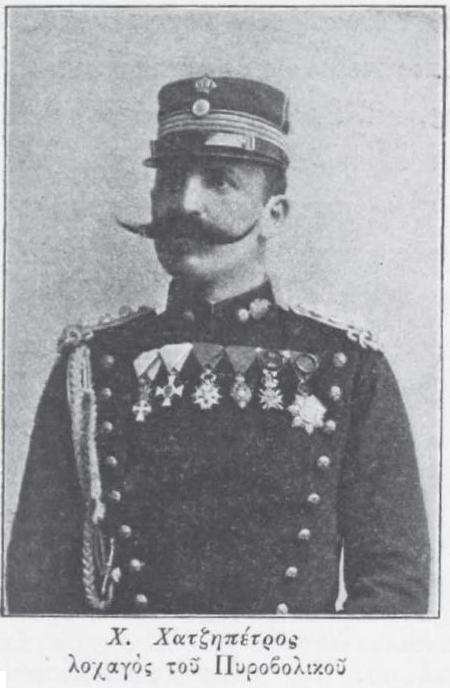 griechischer Militär, 19. Jahrhundert